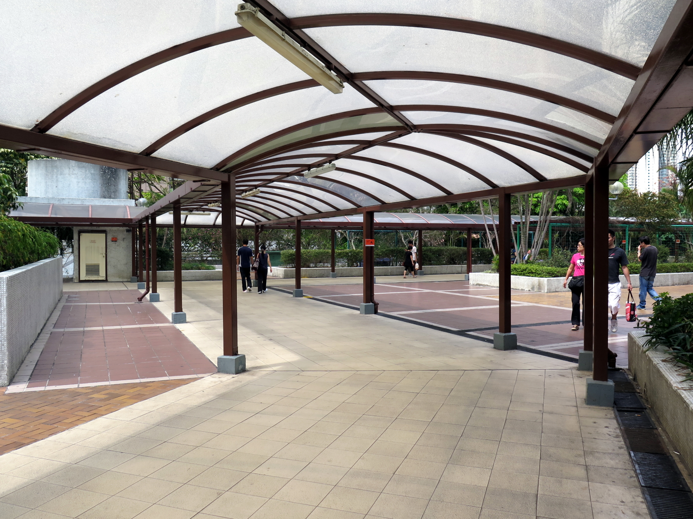 Cheung Wah Estate